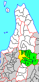 北海道上川郡（石狩国）の位置。